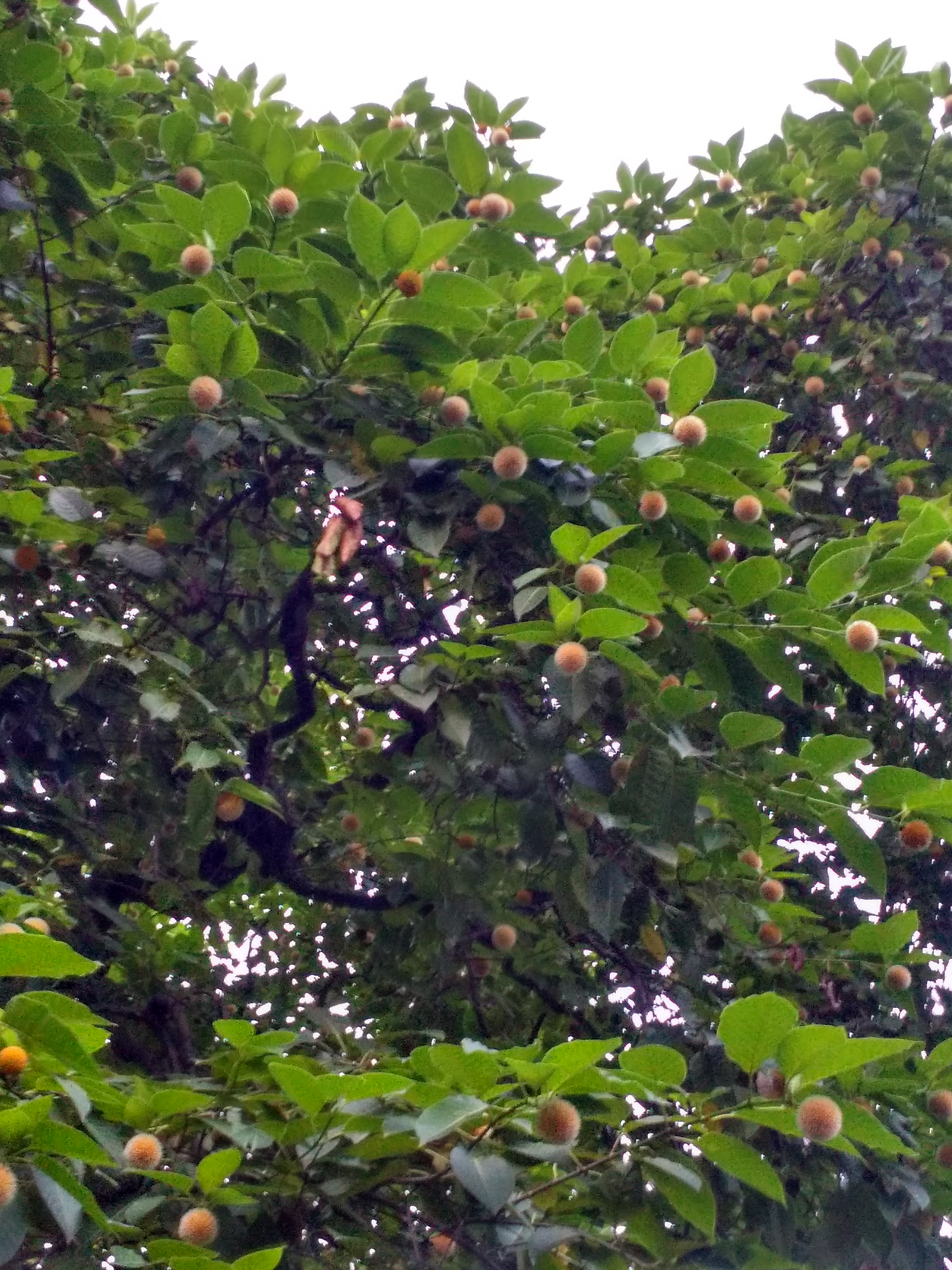 Neolamarckia cadamba at Ramna Park, Dhaka. 2018.